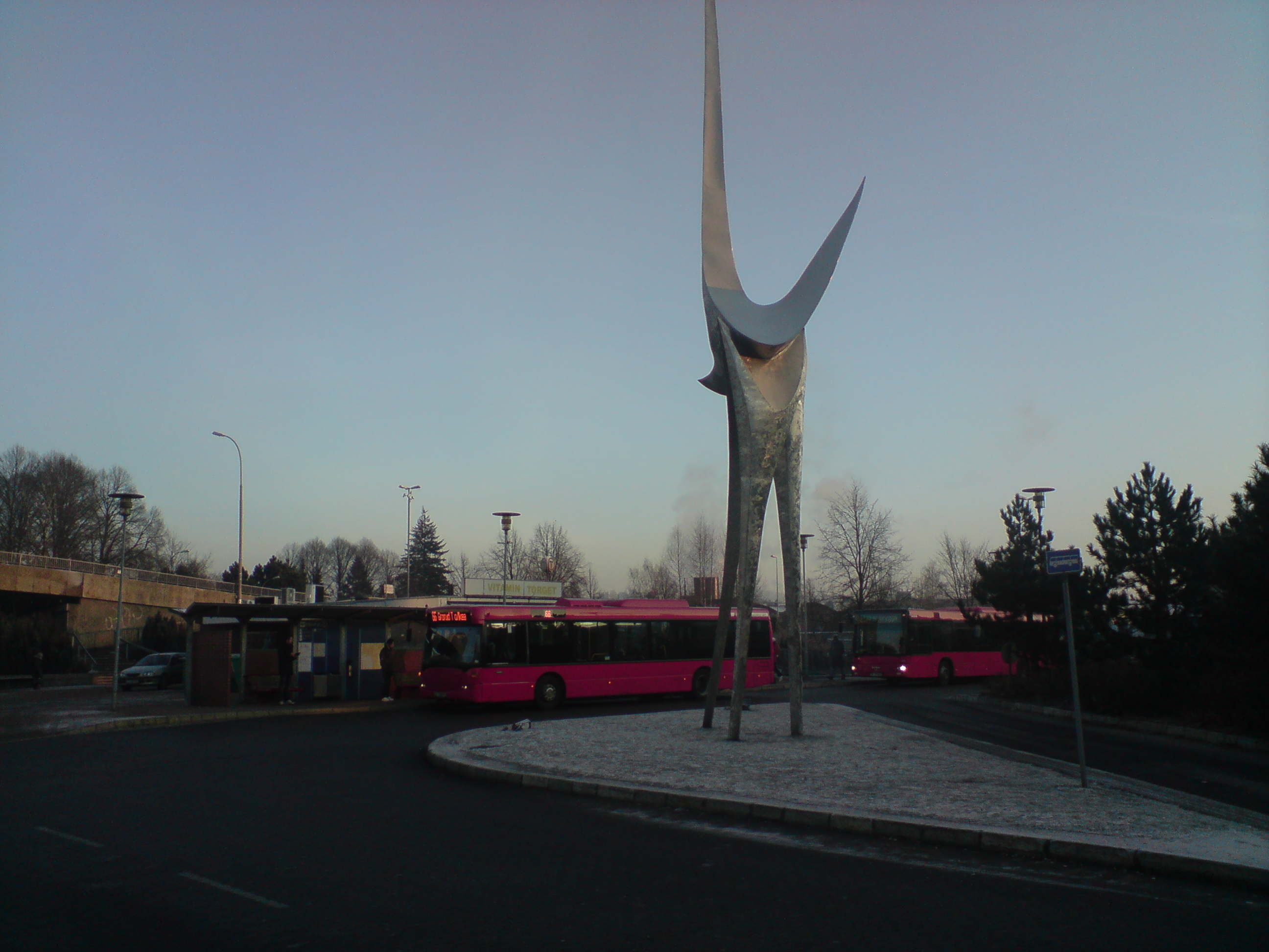 From Helsfyr, Oslo